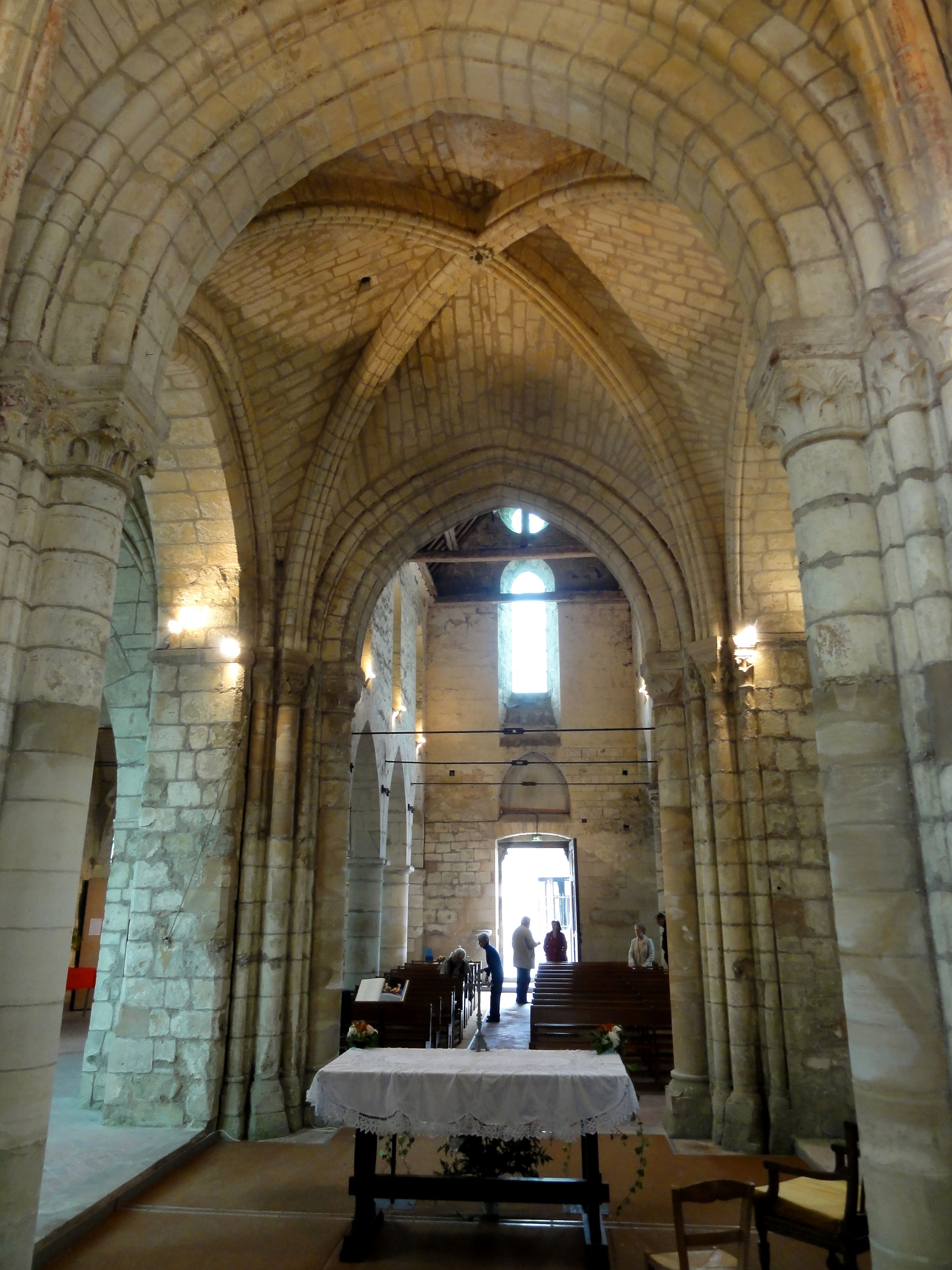 Abside, vue vers l'ouest.